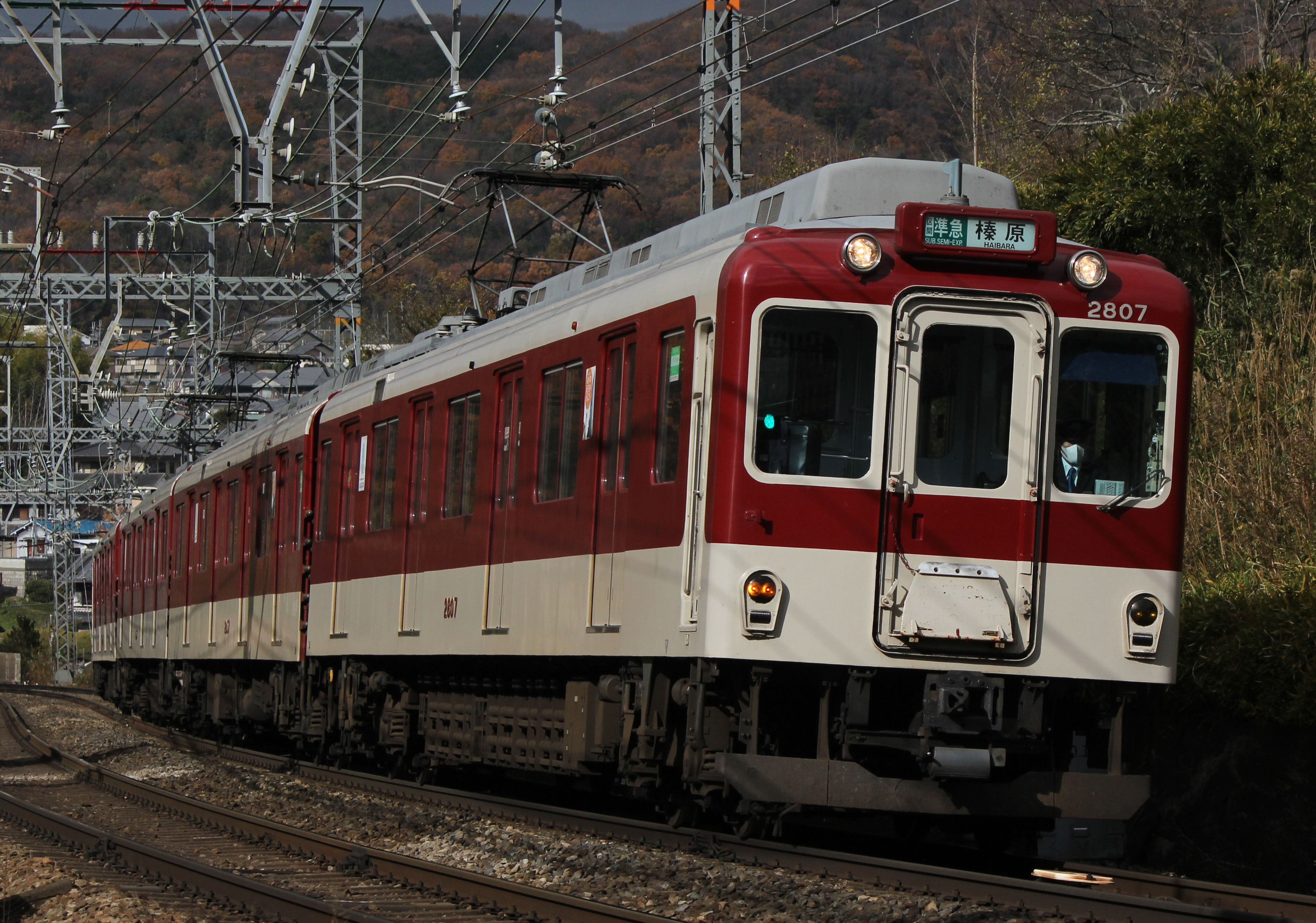 近鉄2800系 関屋-二上間